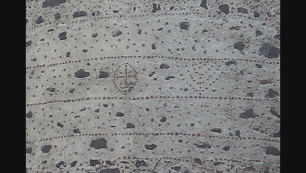 Elementi decorativi sulla faccia di una delle torre cilindriche del Castello Ursino (torre delle bandiere a nord-ovest) a Catania. Si possono notare due simboli religiosi: una croce greca inscritta in un cerchio (ortodossi) e un menorah (ebrei).